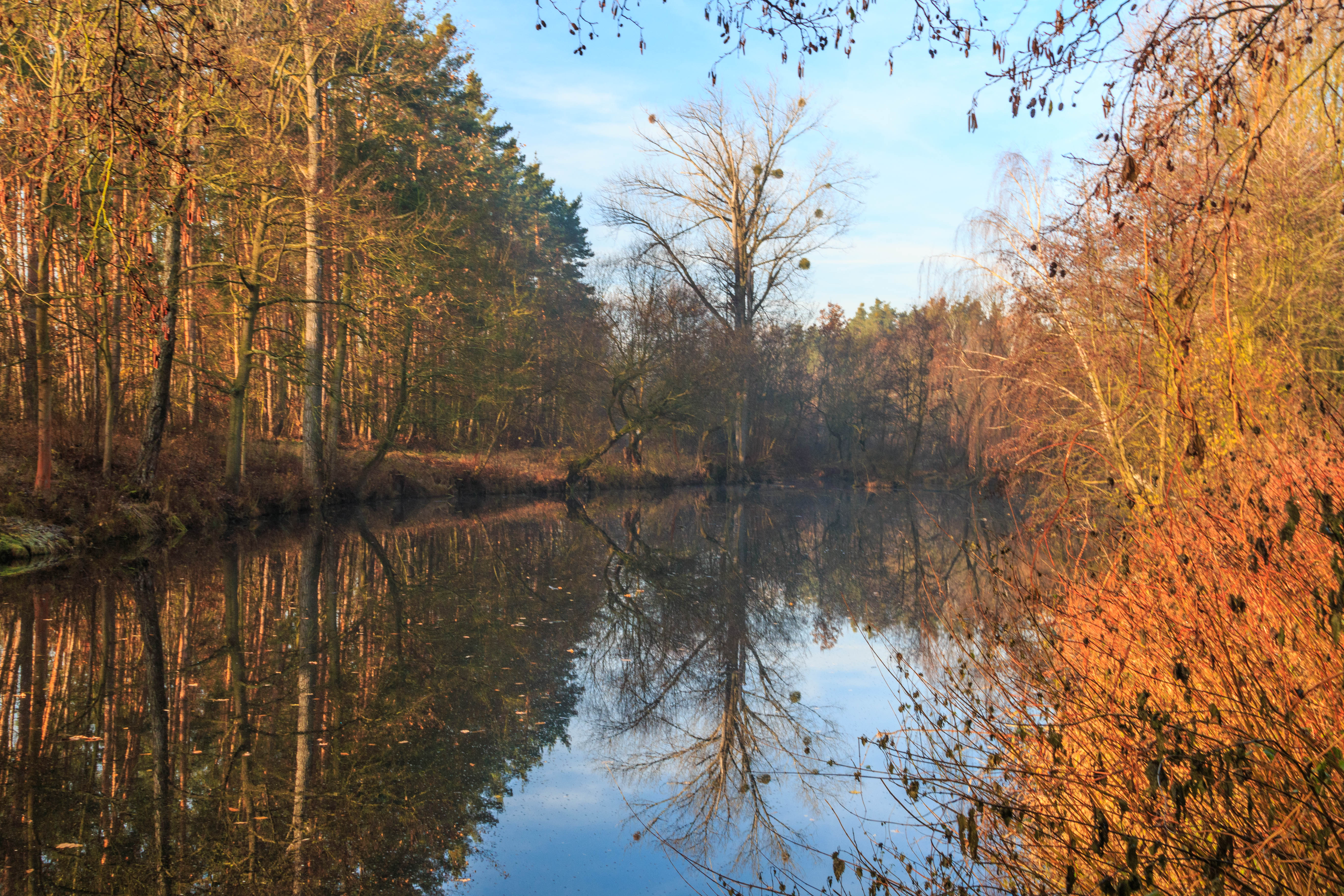 Čepkovo jezero Project: Vodstvo.